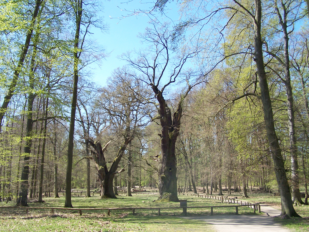 Ivenacker Eichen (Stieleichen, Quercus robur) vorne: ca. 600-700 Jahre; 26 m hoch; 7,45 m Stammumfang; 2,37 m Stammdurchmesser hinten: ca. 500-600 Jahre; 24 m hoch; 6,70 m Stammumfang; 2,13 Stammdurchmesser